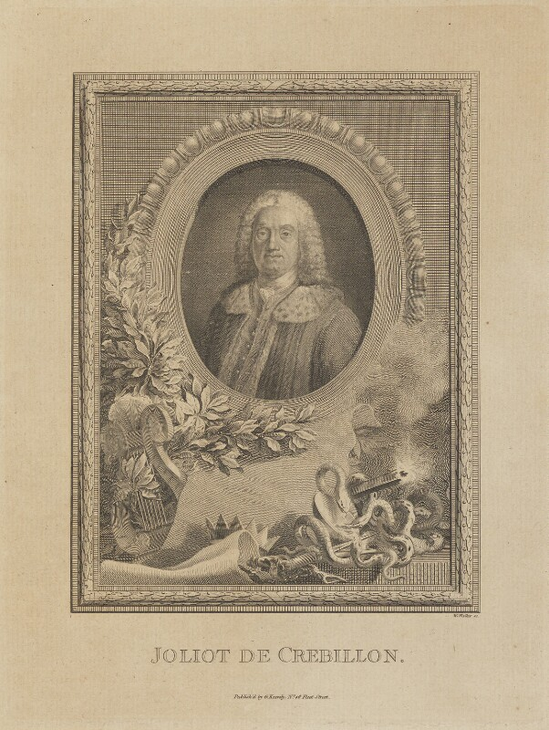 Gravure réalisée par William Walker vers 1773-1790 (208 mm x 155 mm), publiée par George Kearsley. National Portrait Gallery (NPG D14558).